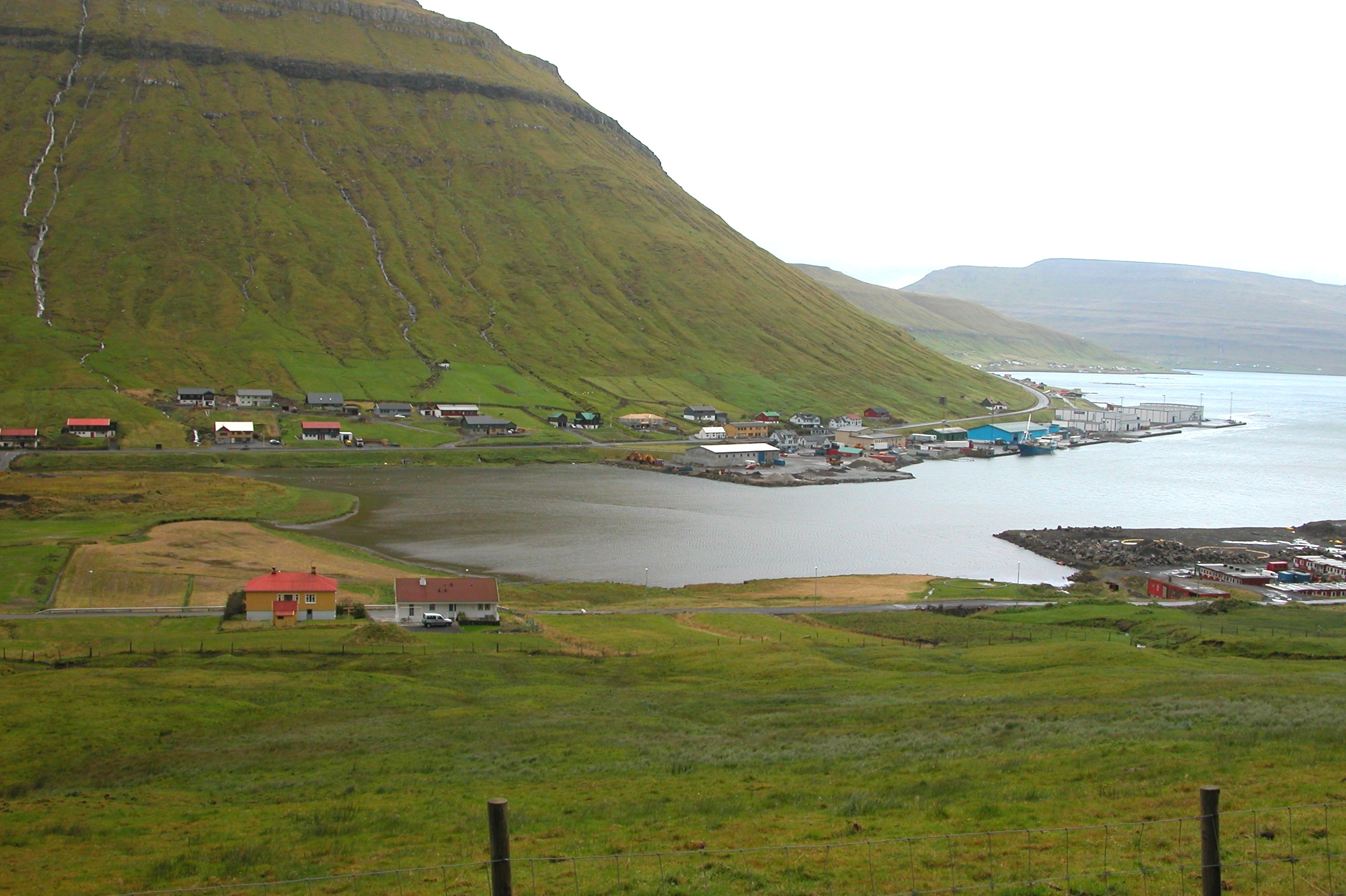 The fjord Kollafjørður on Streymoy, Faroe Islands